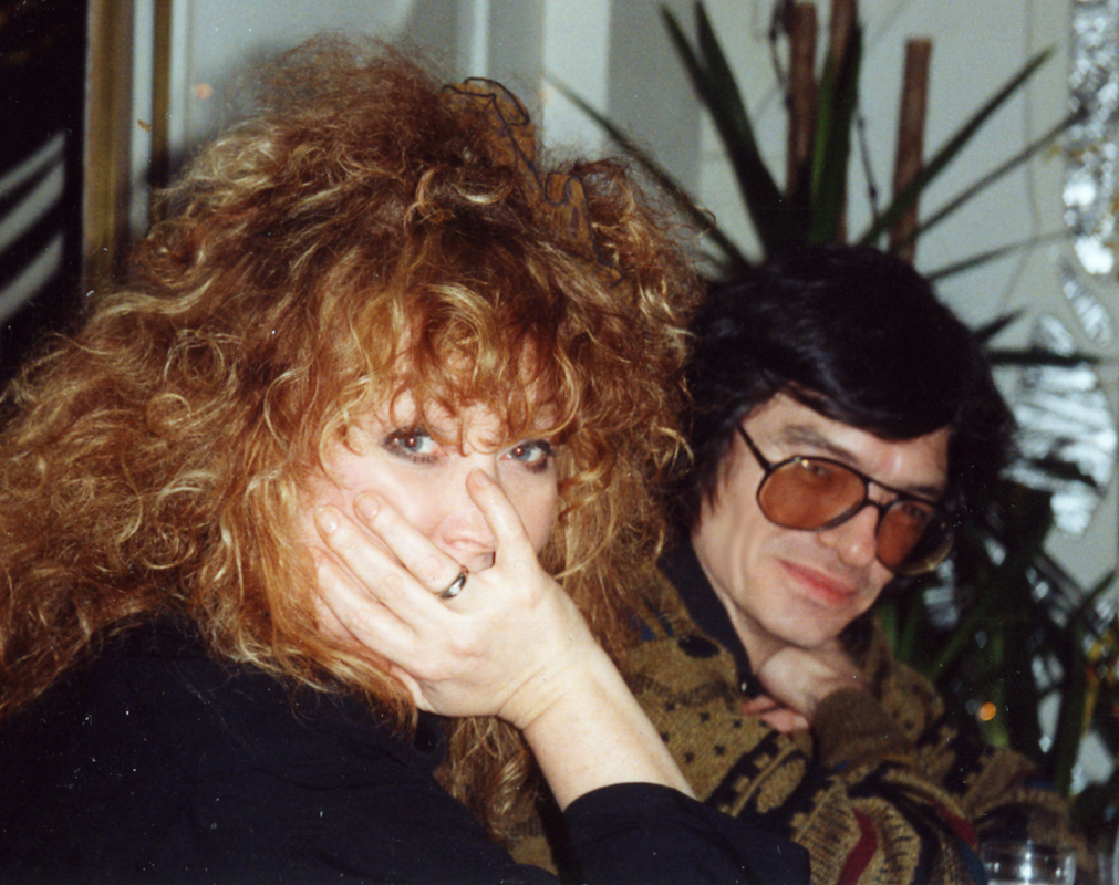 Алла Пугачёва в гостях у Юрия Чернавского (Берлин, Германия, 1992)